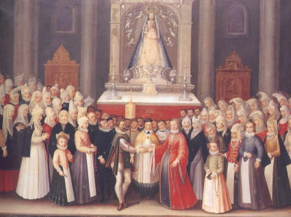 escena de boda en el interior de la basílica de Begoña, con detalle de los trajes típicos de la época